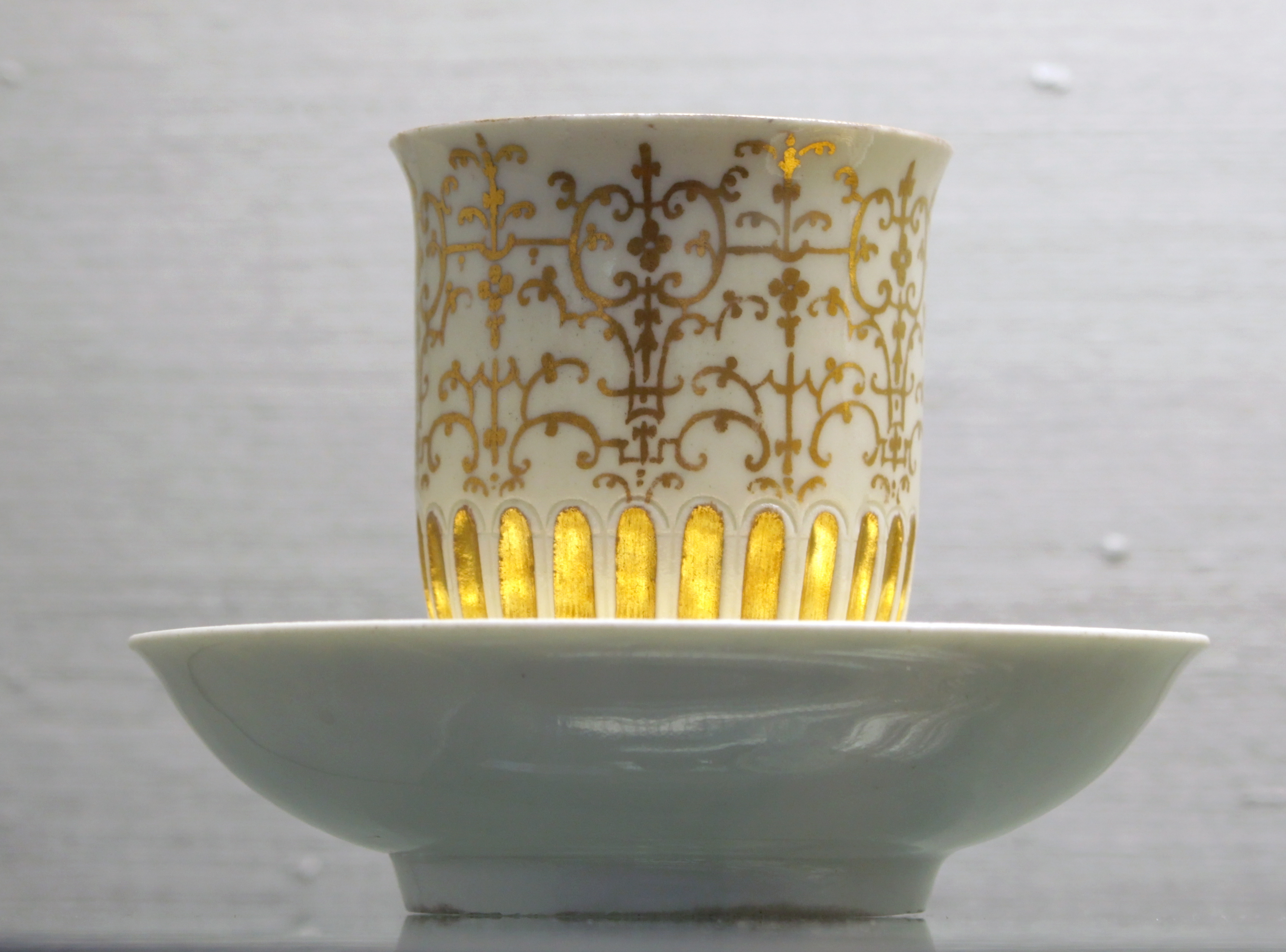 Tasse à chocolat et sa soucoupe. Porcelaine Böttger, Meissen, vers 1720. Kunstgewerbemuseum, à Berlin.